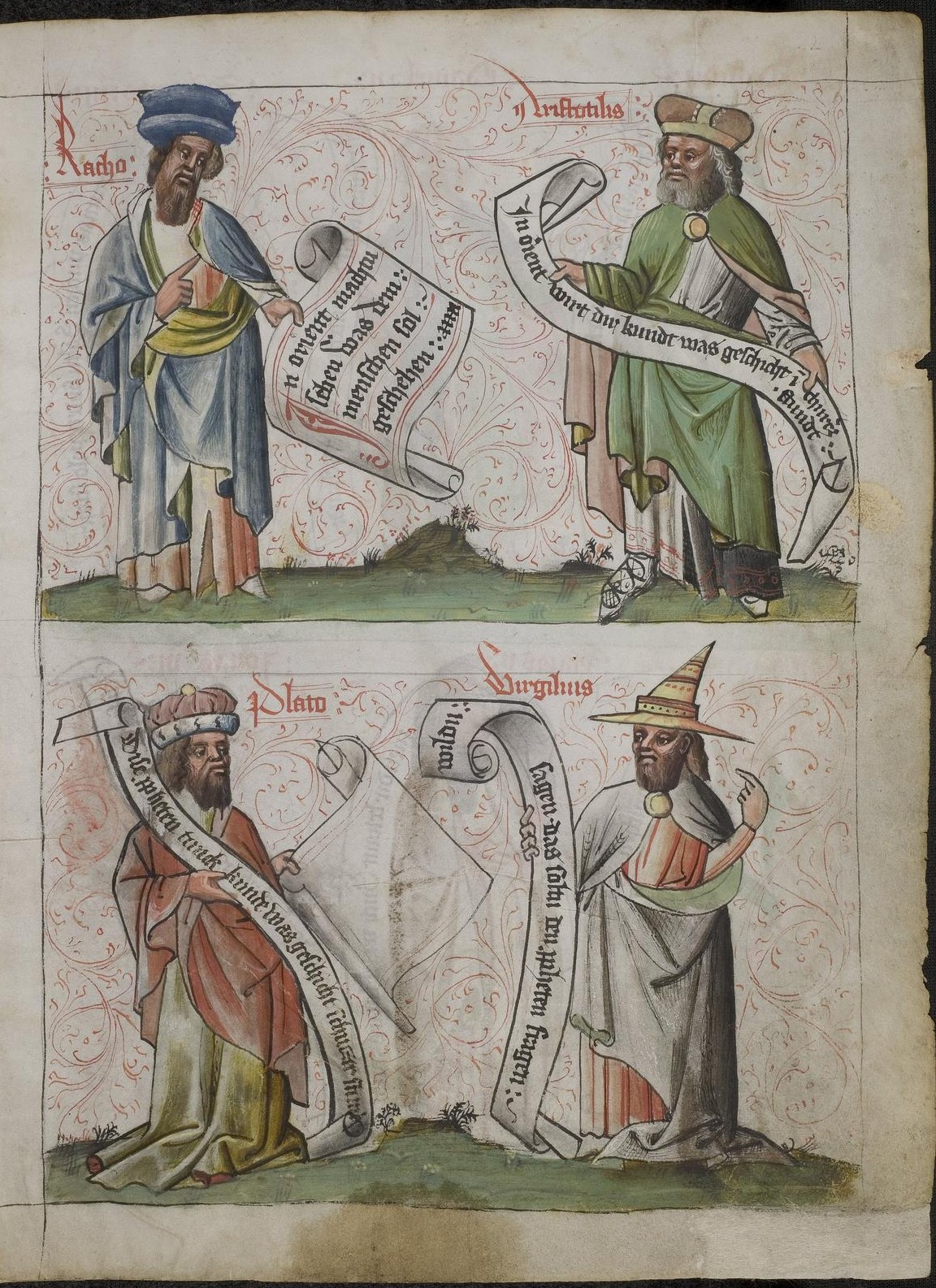 Codex Palatinus germanicus 7, Blatt 2r der Handschrift: Wahrsagebuch, 4 Wahrsager, Namenszusätze: "Katho", "Aristotelis", "Plato", "Virgilius".